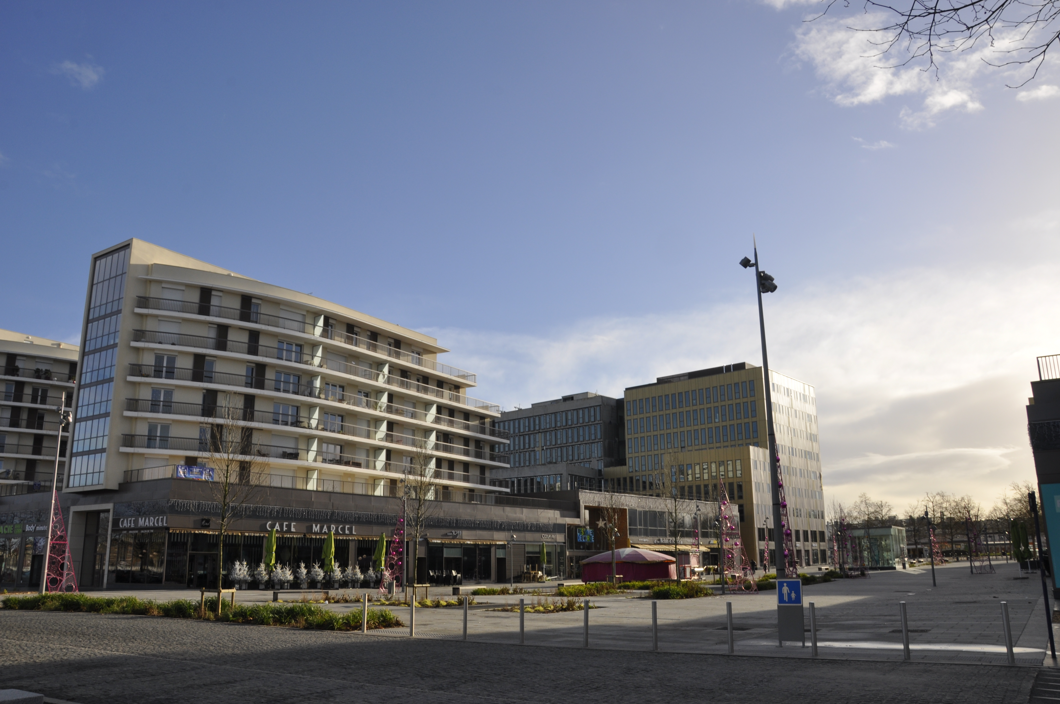 place centrale des rives de l'Orne ; avant la construction de la ligne T2 du tramway